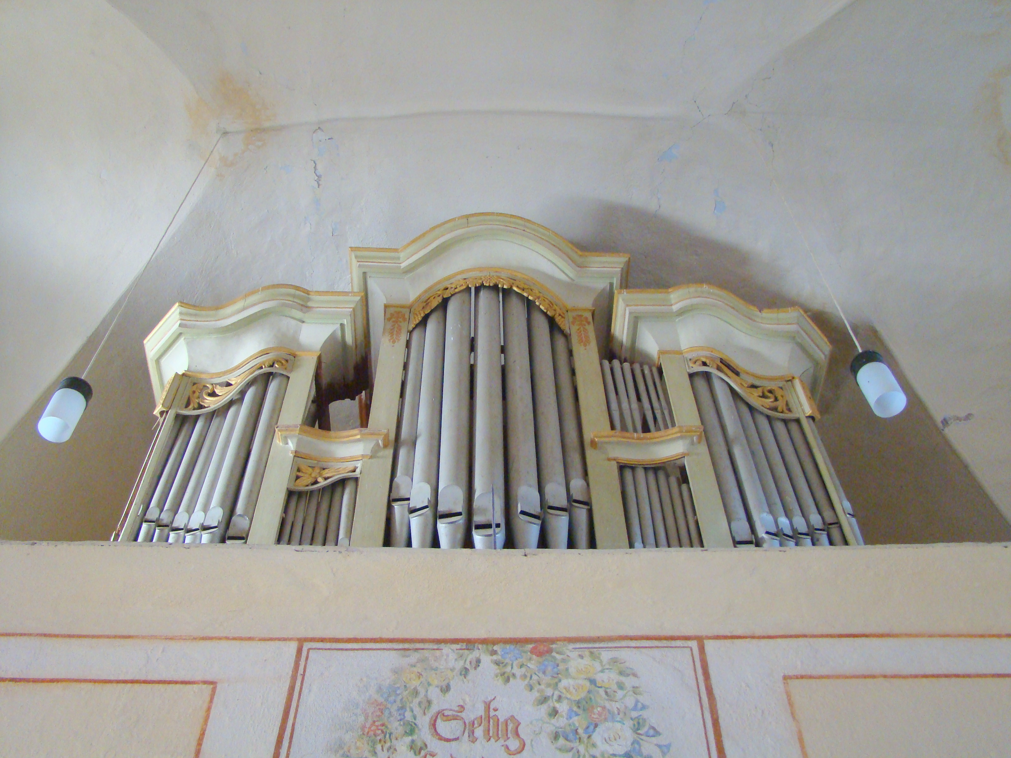 Biserica evanghelică, sat Rodbav; comuna Șoarș 115 sec. XIII-XIX